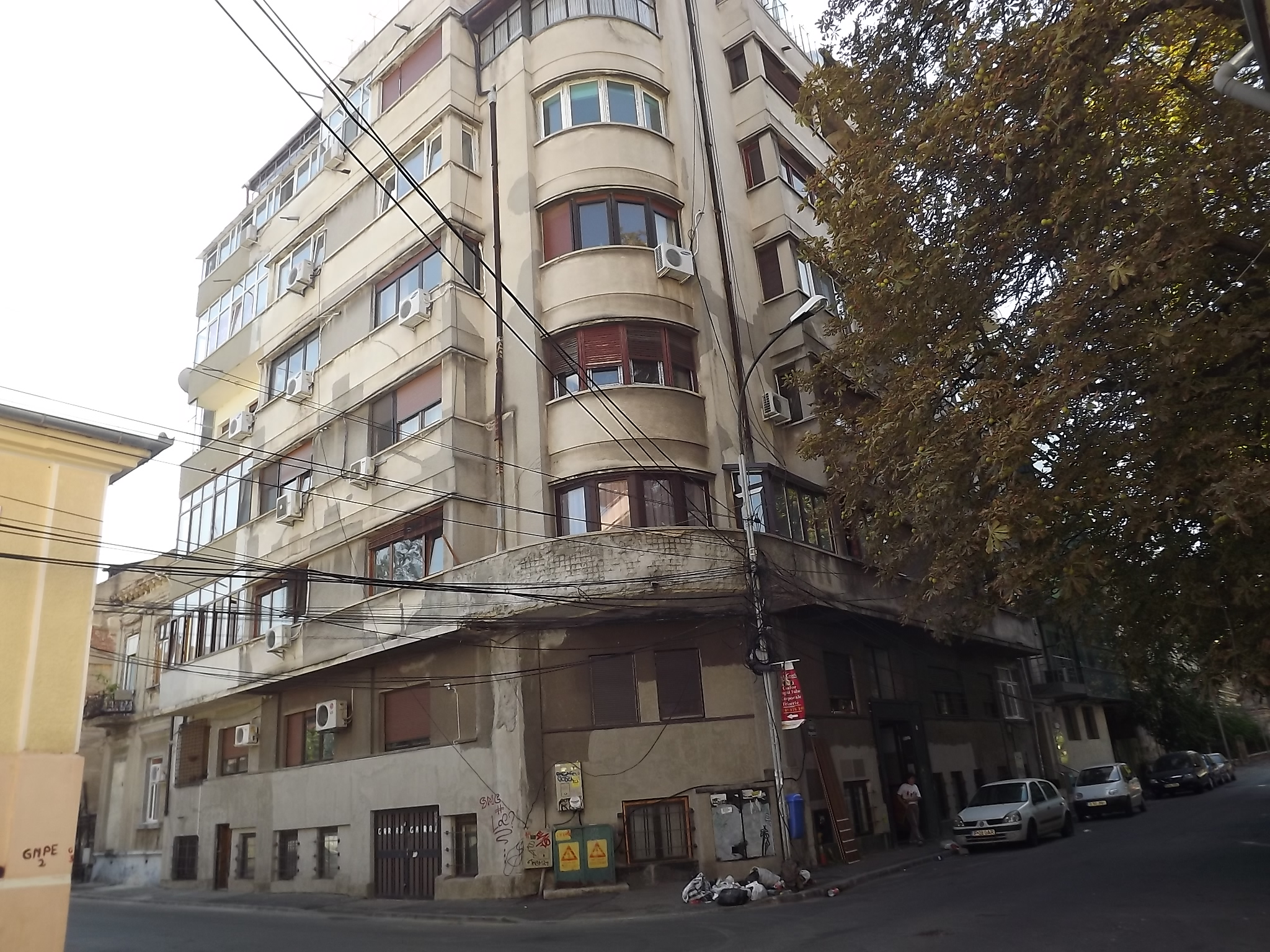 Casărt